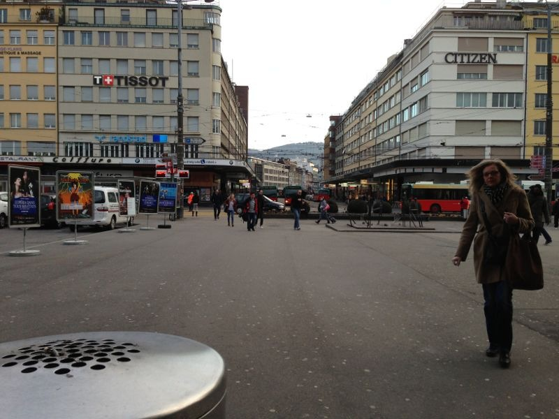 Bahnhof Biel